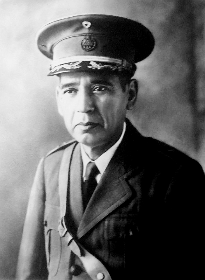 General de brigada Maximiliano Hernández Martínez, Presidente de la República de El Salvador (1931-1934; 1935-1944).